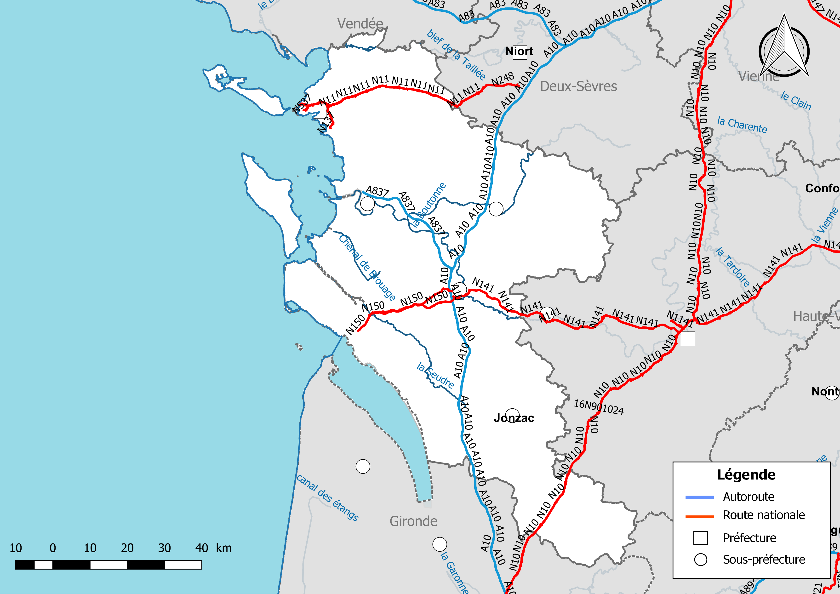 Carte du réseau routier national, constitué des autoroutes et des routes nationales, dans le département de la Charente-Maritime (France). Situation au 1er janvier 2019.